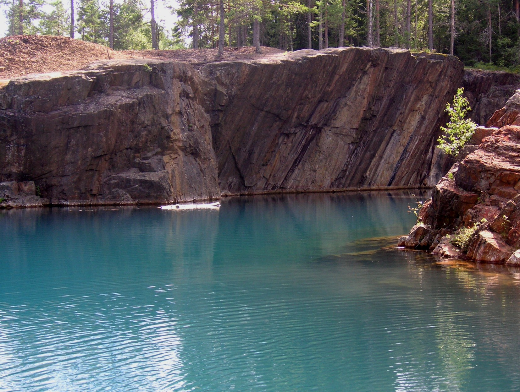 Gruvhål vid Silverringen i Dalarna